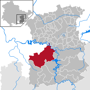 Remptendorf in Thuringia - Saale-Orla-Kreis